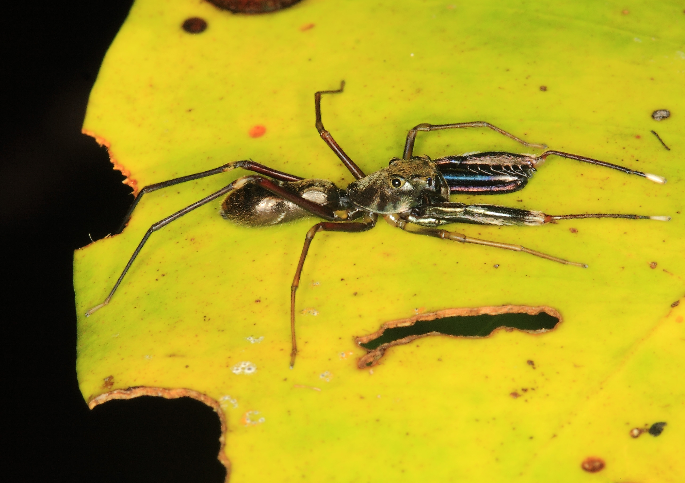 Male Diolenius phrynoides jumping spider Indonesia, West Papua, Sorong, Raja Ampat: Kri Island (vic. Pulau Mansur), 60m asl., 30.12.2010